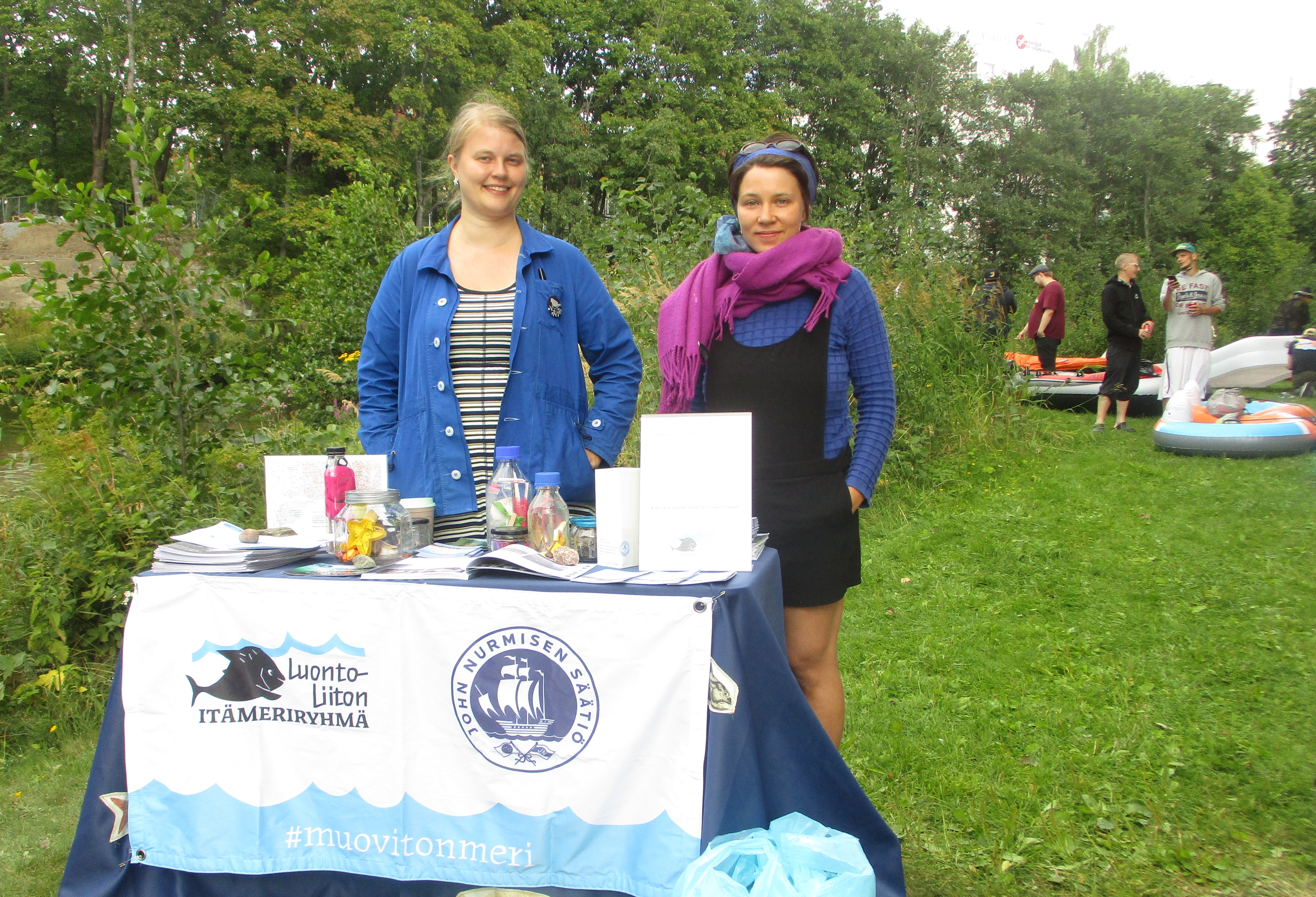 Luontoliitto jakoi roskapusseja ja esitteitä vuoden 2019 kaljakellunnan lähtöpaikalla.